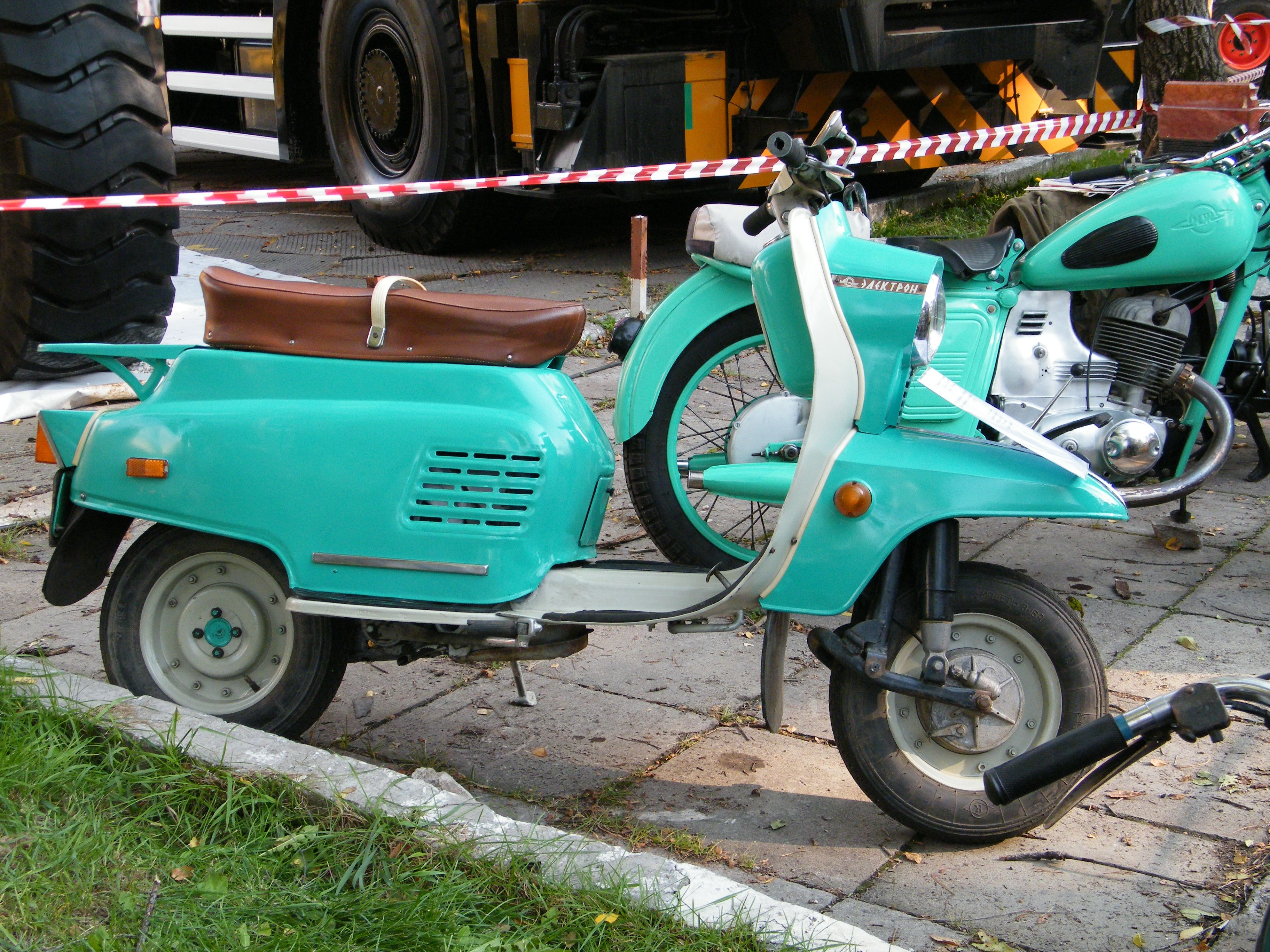 Мотороллер "Электрон", СССР, 1970-е годы